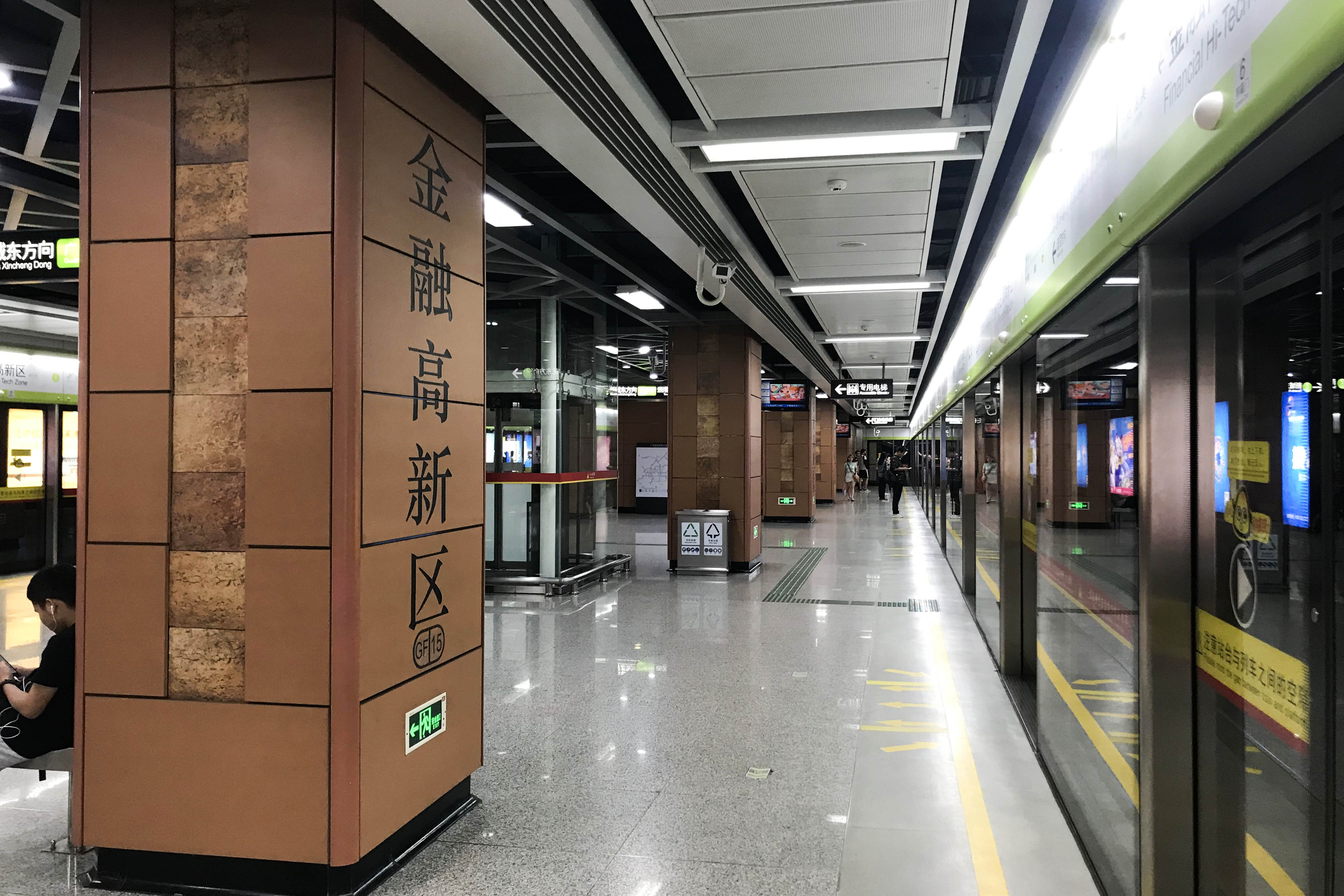 广佛地铁金融高新区站